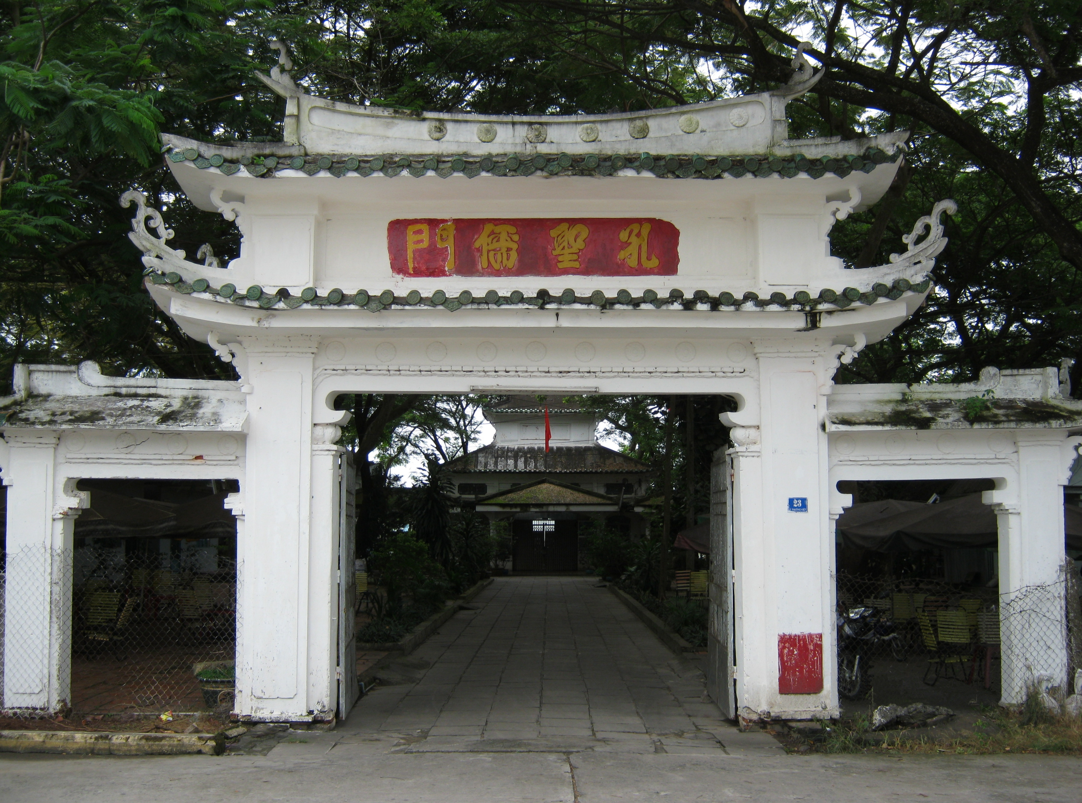 Văn Thánh miếu Cao Lãnh hiện tọa lạc tại đường Lý Thường Kiệt, thuộc phường 1, thành phố Cao Lãnh, tỉnh Đồng Tháp, Việt Nam.